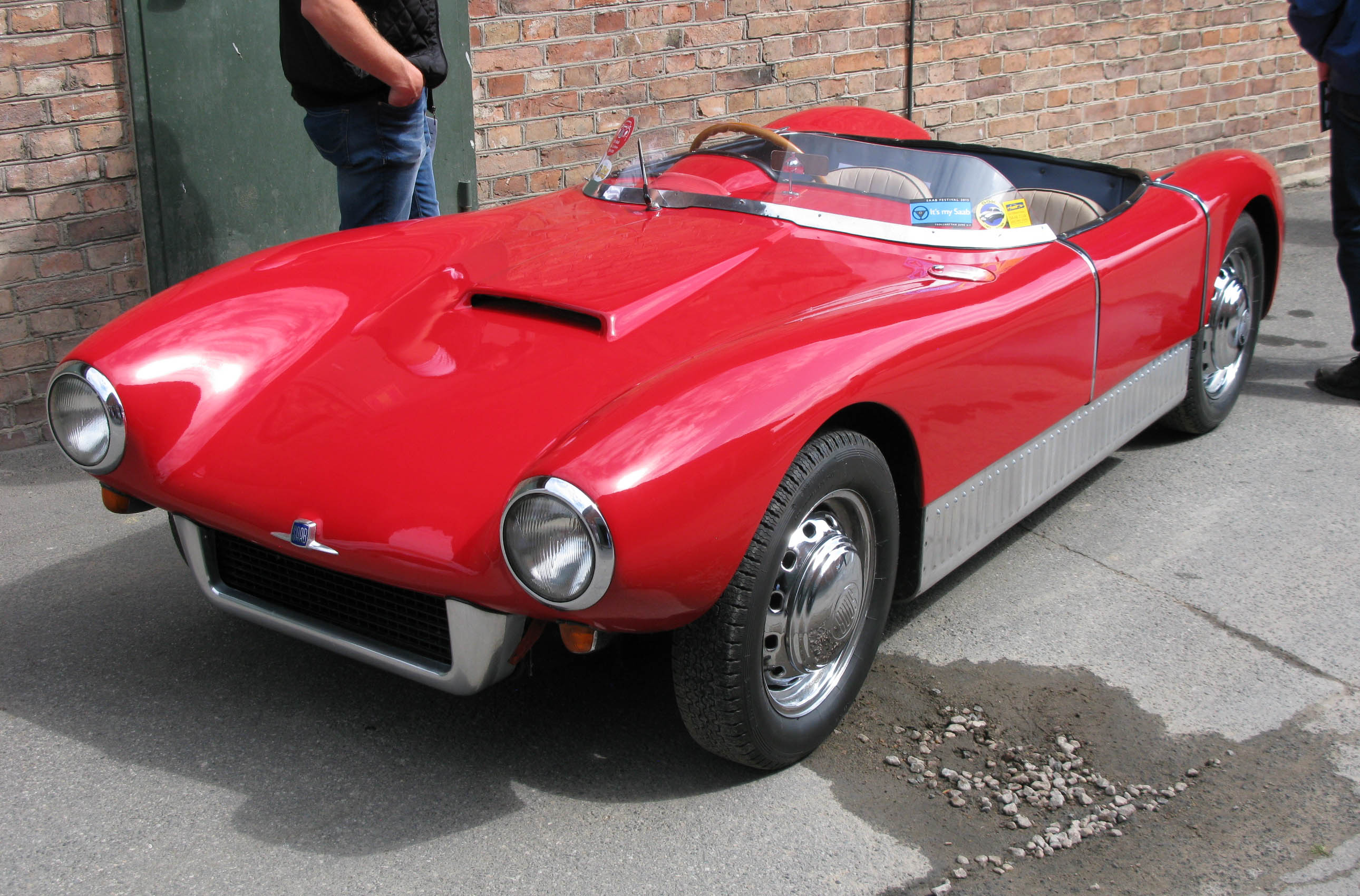 1957 Saab 94 Sonett.